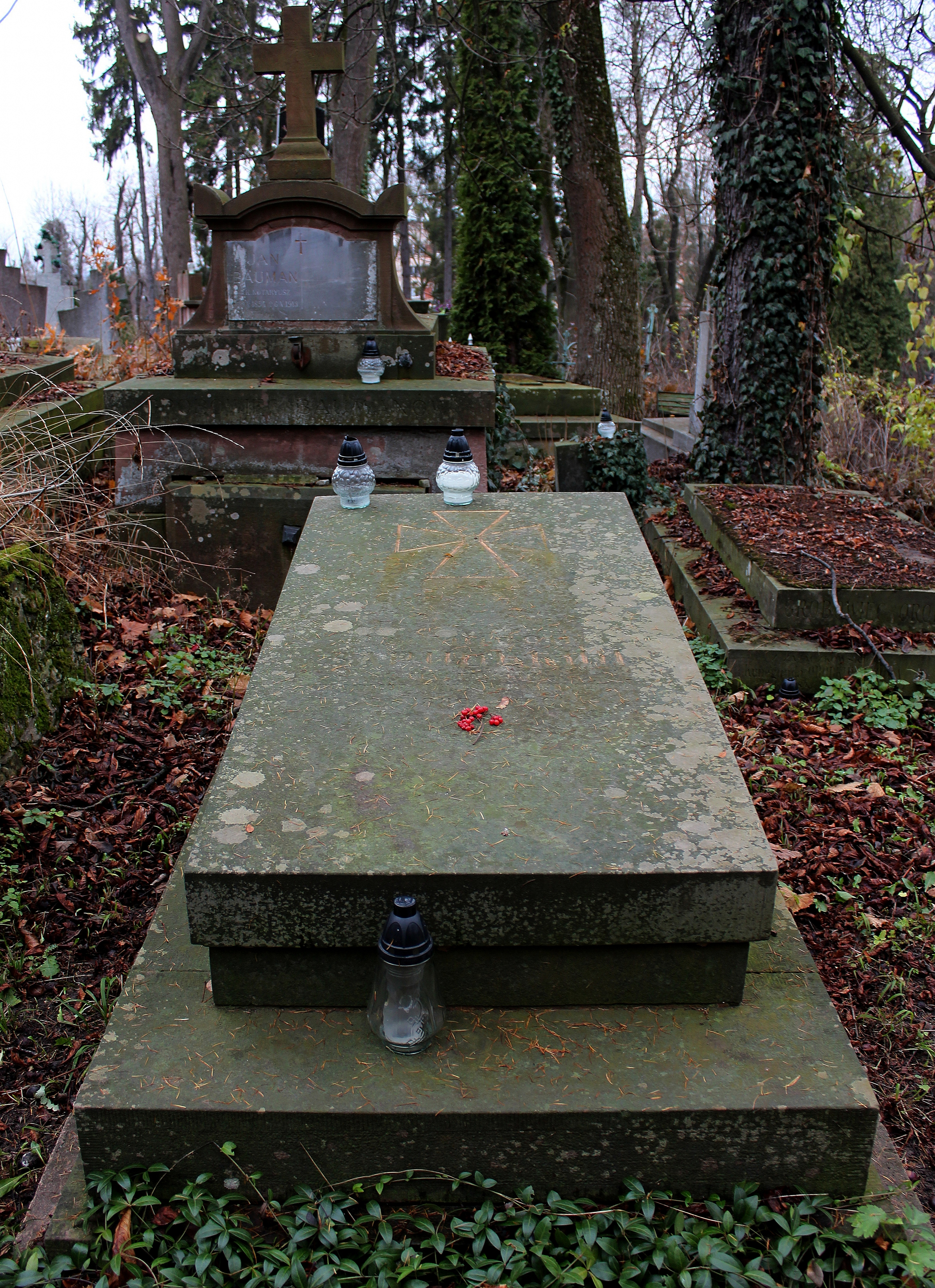 Надгробок на могилі професора М.Зарицького.Личаківський цвинтар , поле № 59.